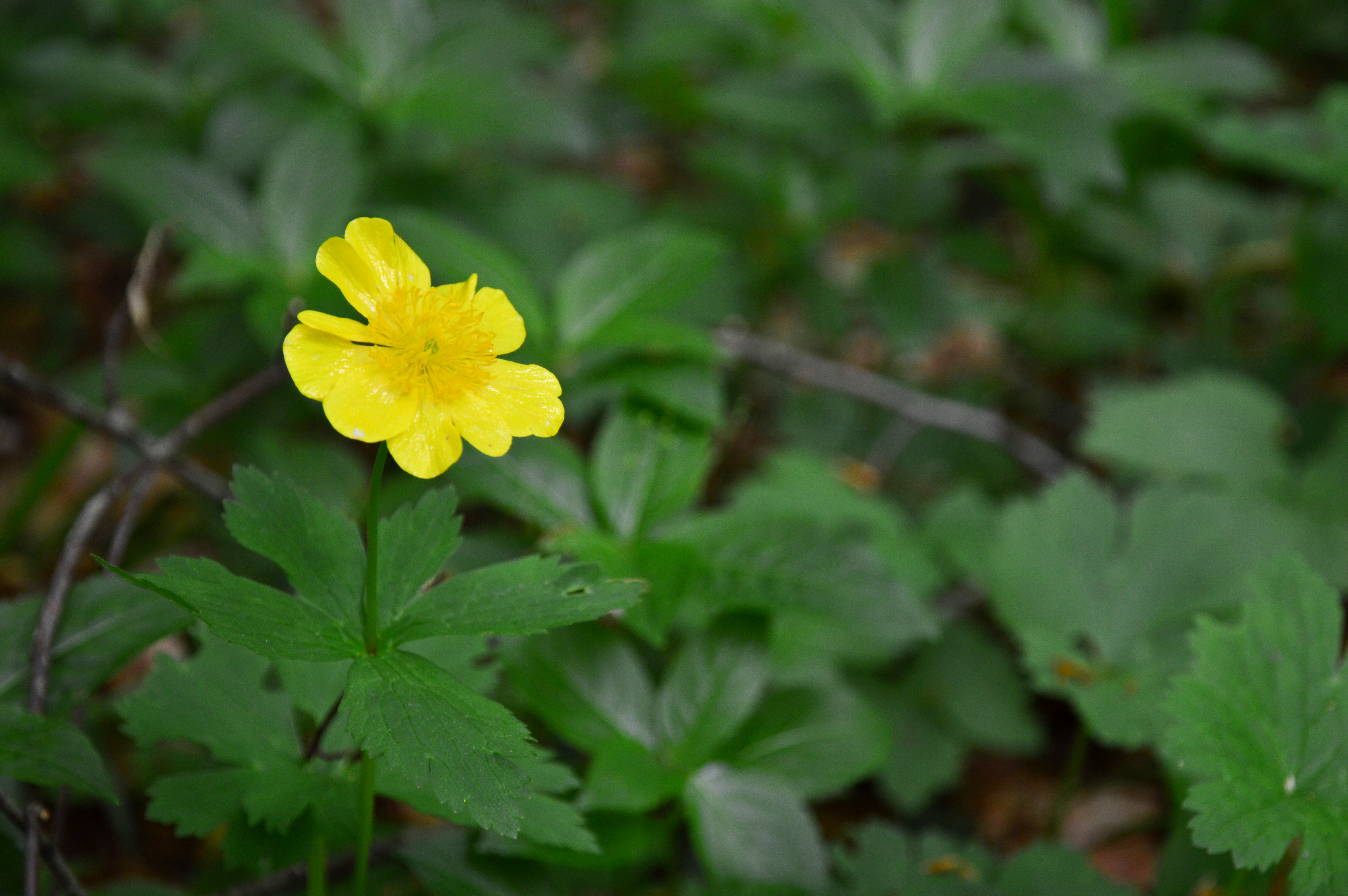 Жовтець карпатський (Ranunculus carpatica) на території Угольсько-Широколужанського масиву Карпатського біосферного заповідника.